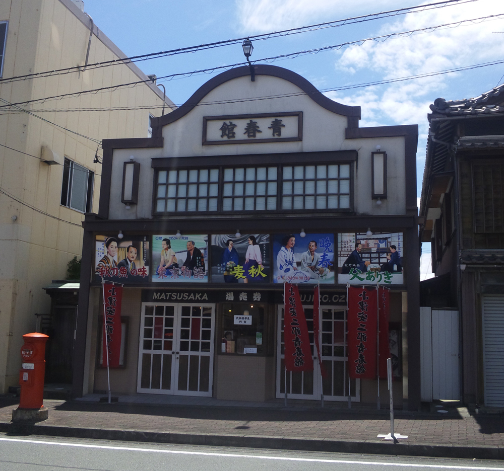 小津安二郎青春館(三重県松阪市)